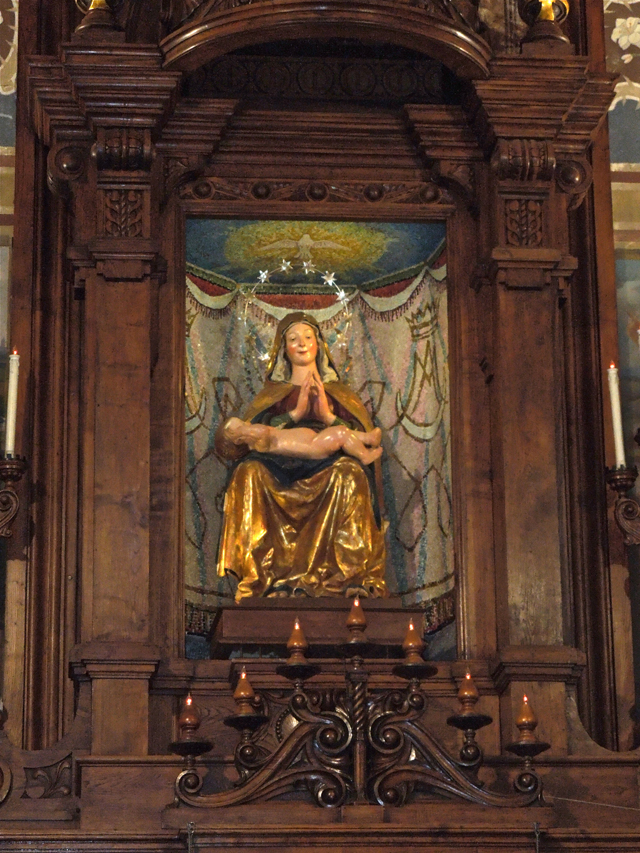 Madonna col Bambino, detta la Madonna dei Lumi. Statua lignea, dorata e policroma, eseguita nel 1489 e attribuita a Giovanni di Biasuccio. L'effigie è collocata nell'edicola centrale dell'altare maggiore della chiesa della Madonna dei Lumi di Civitella del Tronto in provincia di Teramo.